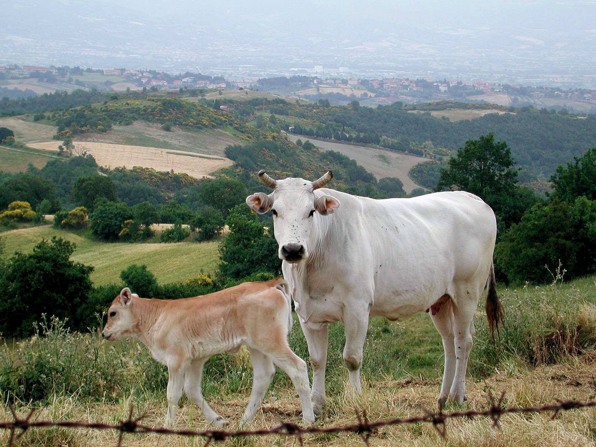 In Tuscany: razza Chianina, da dove provengono le bellissime bistecche fiorentine.